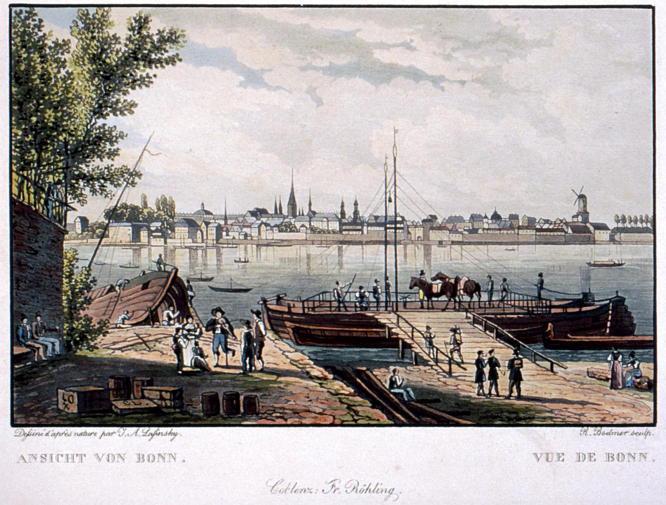 Altkolorierter Aquatintastich von R.Bodmer nach Vorlage von J.A.Lasinsky